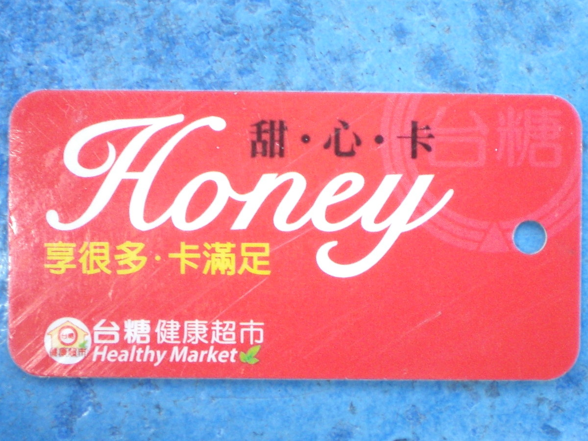 中文（台灣）: 台糖健康超市甜心卡正面，長5公分，寬2.5公分。